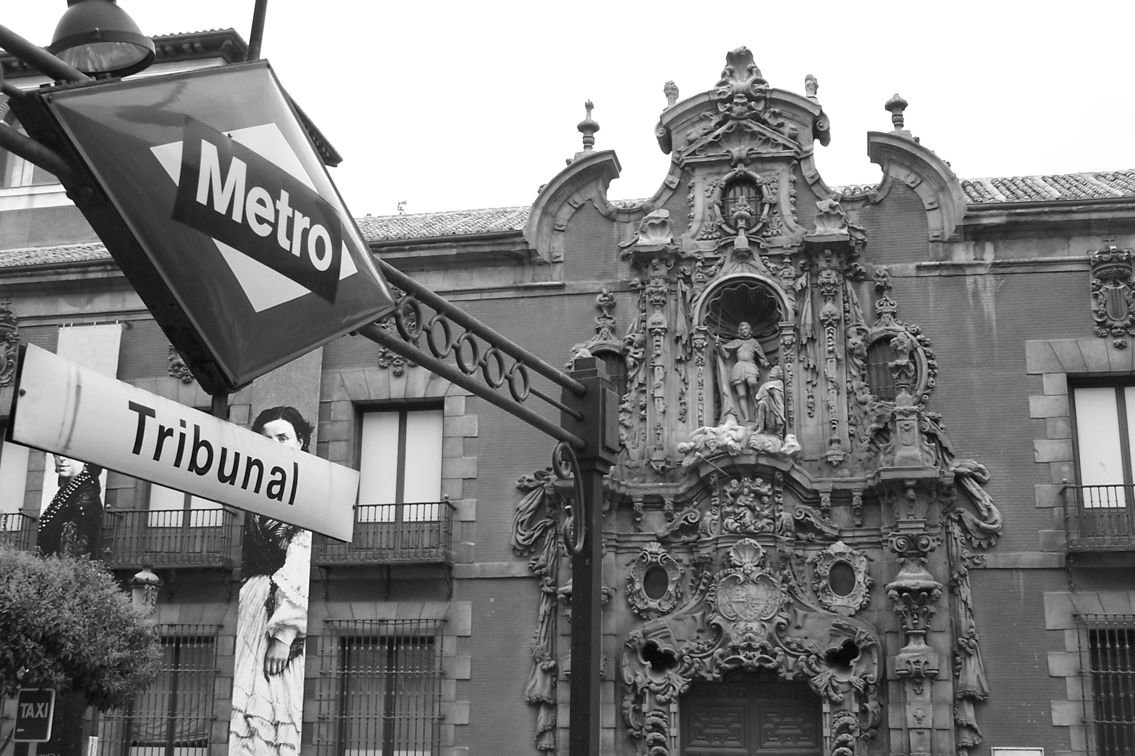 Portada del Hospicio desde la boca de Metro de Tribunal (Madrid).